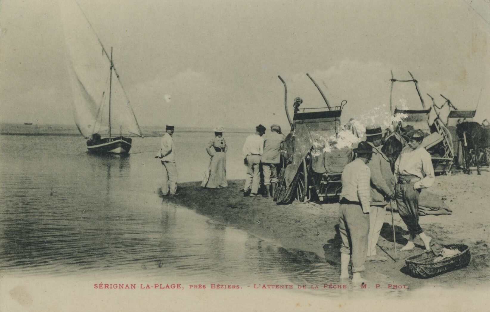 Sérignan-la-Plage, près de Béziers. - L'attente de la pêche : carte postale (1ère moitié du XXe siècle)